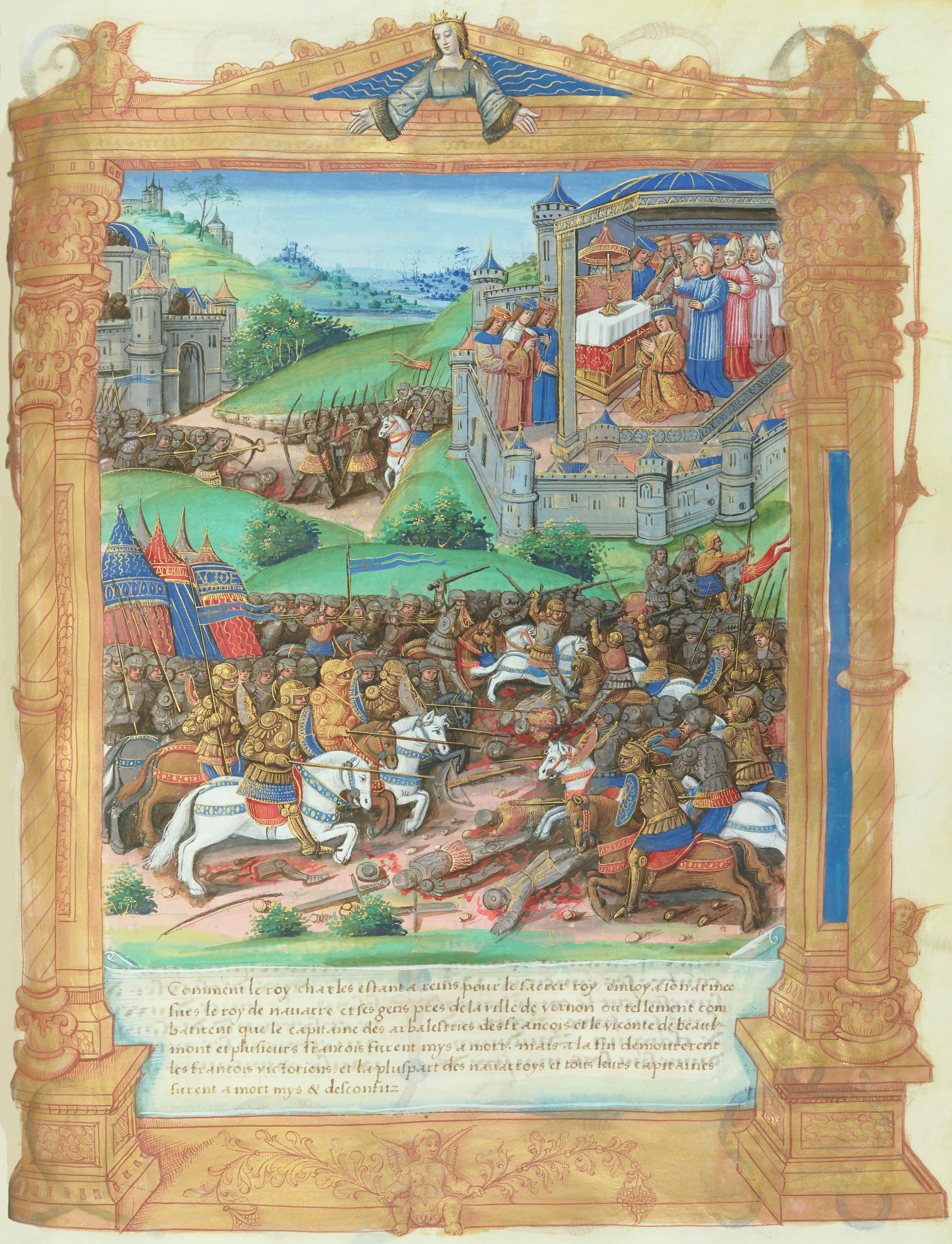 La bataille de Cocherel. En haut à droite, représentation du sacre de Charles V. Enluminure ornant le manuscrit de la Toison d'or de Guillaume Fillastre, ms. Français 138, folio 247 recto, XVe siècle.